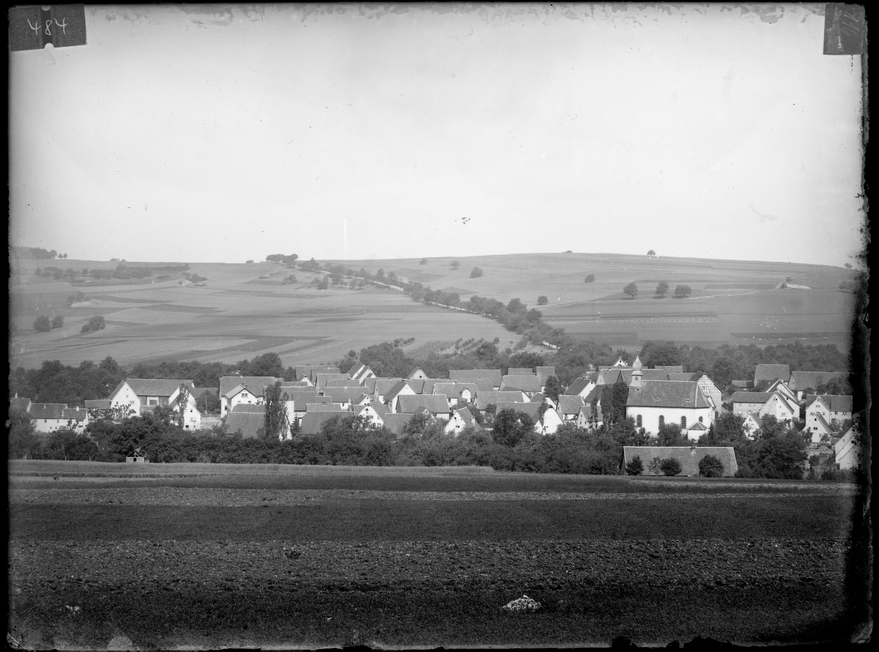 Rinschheim